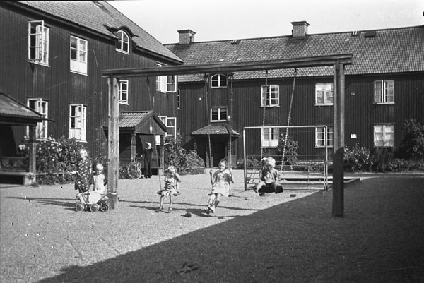 Nödbostäder i Alvik, Bromma, väster om Stockholm. Gårdsplan i ett av de bostadshus som revs när Brommadepån byggdes 1942. SL:s vagnhall som ligger här 2012 har fastighetsbeteckningen Akka 4. Objektidentitet: 2016-9. Publicerat av: Spårvägsmuseet. Foto från oktober 1942.